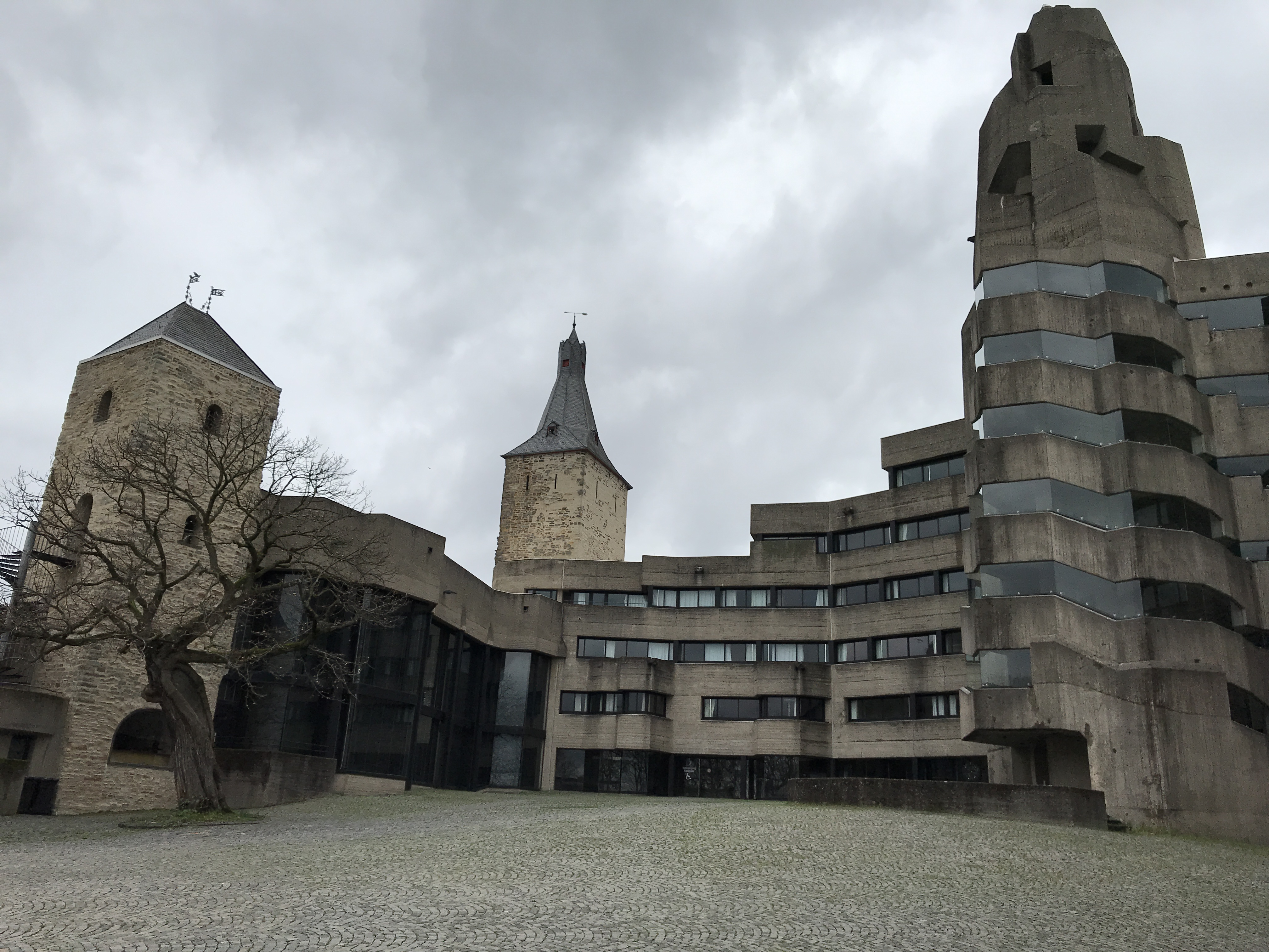 Rathaus Bensberg